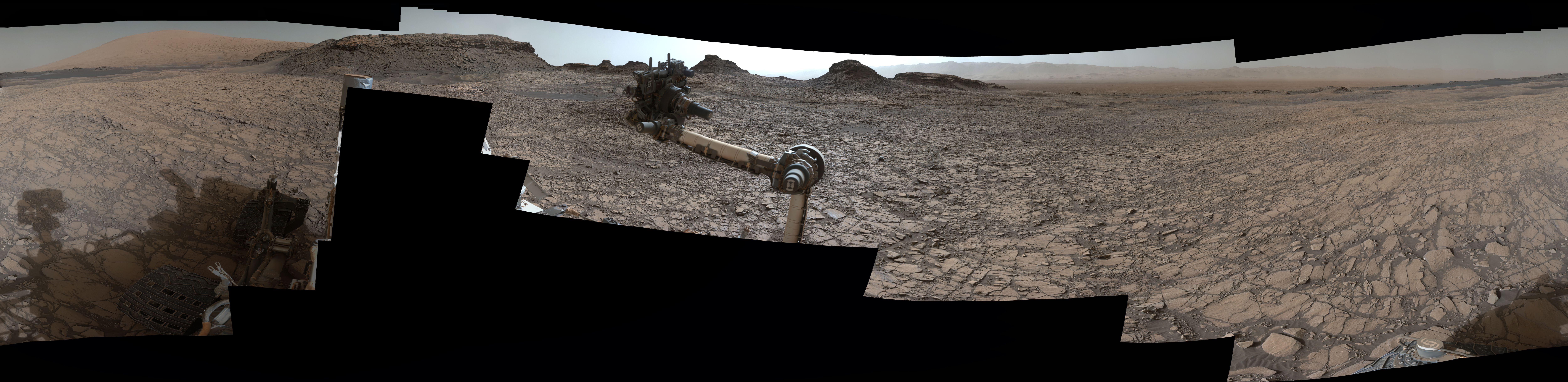 Das 360 Grad Panorama von "Murray Buttes". Die dunkle, abgeflachte Hochebene links neben dem Roverarm ist in etwa 165 Meter hoch und 656 Meter breit.